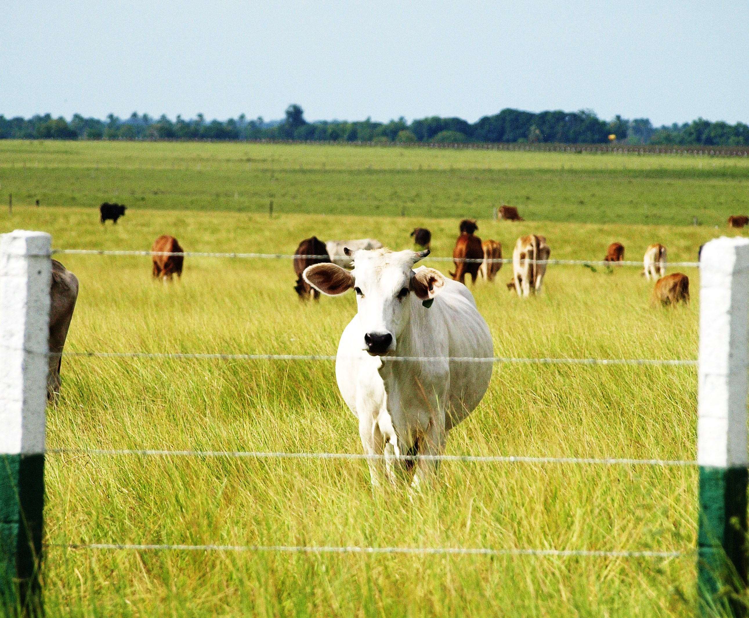 Hato de ganado en los Llanos Venezolanos.